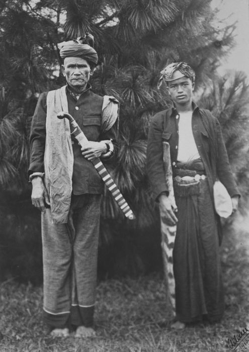 Foto. De foto is op karton geplakt.. Portret van de vorst van Kabanjahé, met een jongere man naast zich